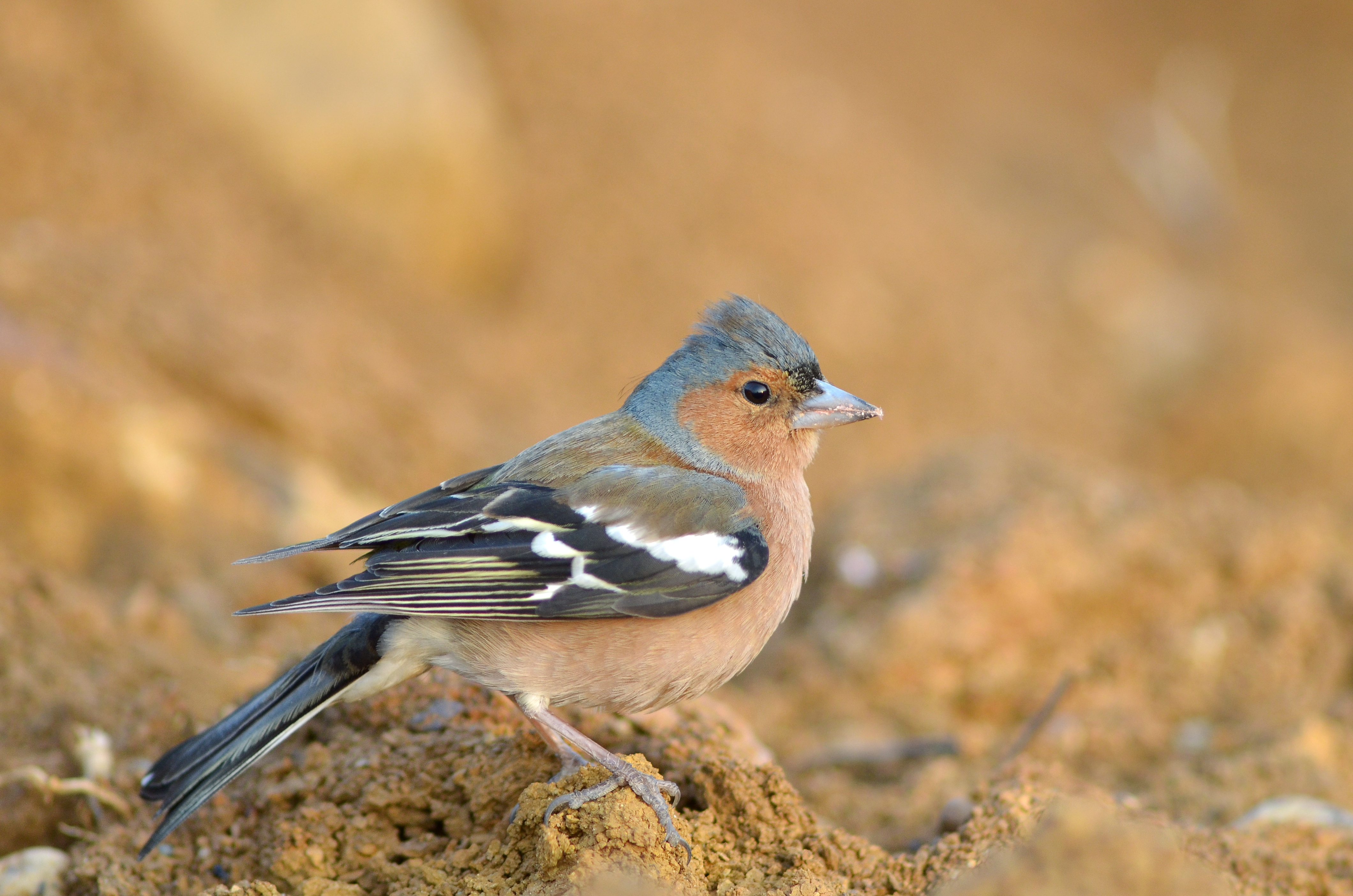 Fringilla coelebs - Chaffinch - Pinson des arbres. Jambes, Namur, Belgium.